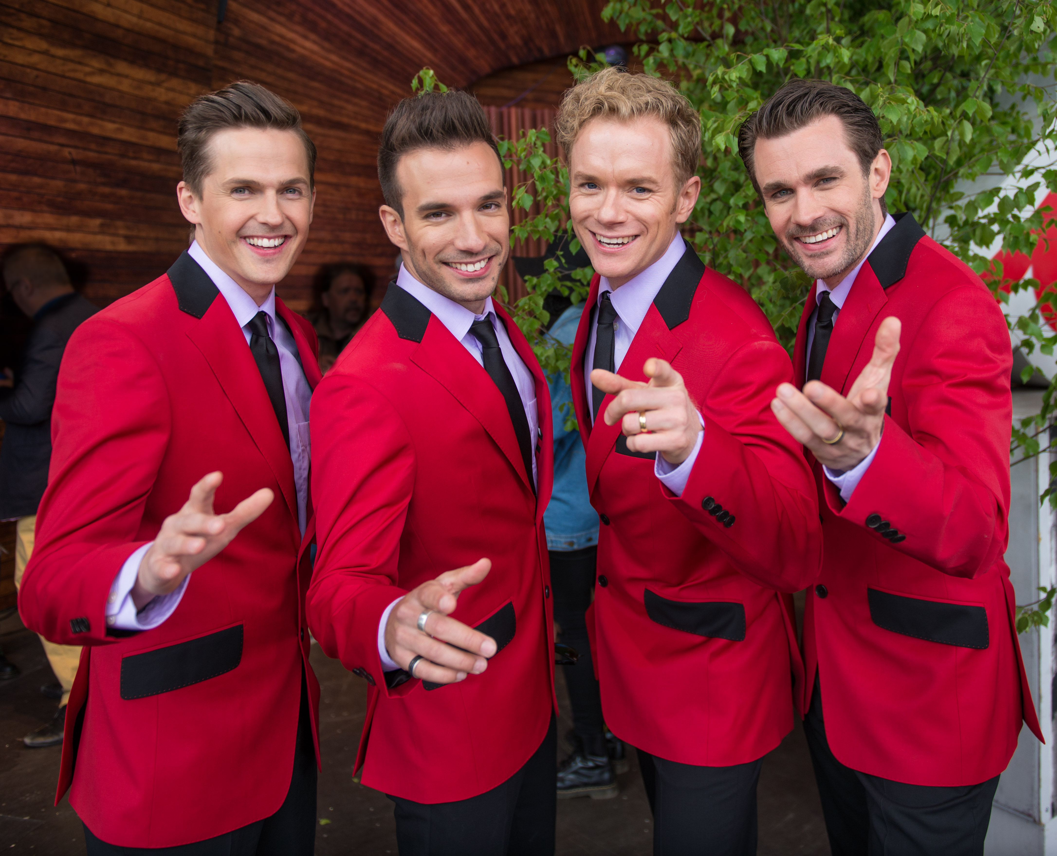 Jersey Boys med David Lindgren, Bruno Mitsogiannis, Peter Johansson och Robert Rydberg var några av artisterna inför Allsång på Skansen som presenteras den 10 juni 2015 på Skansen i Stockholm.